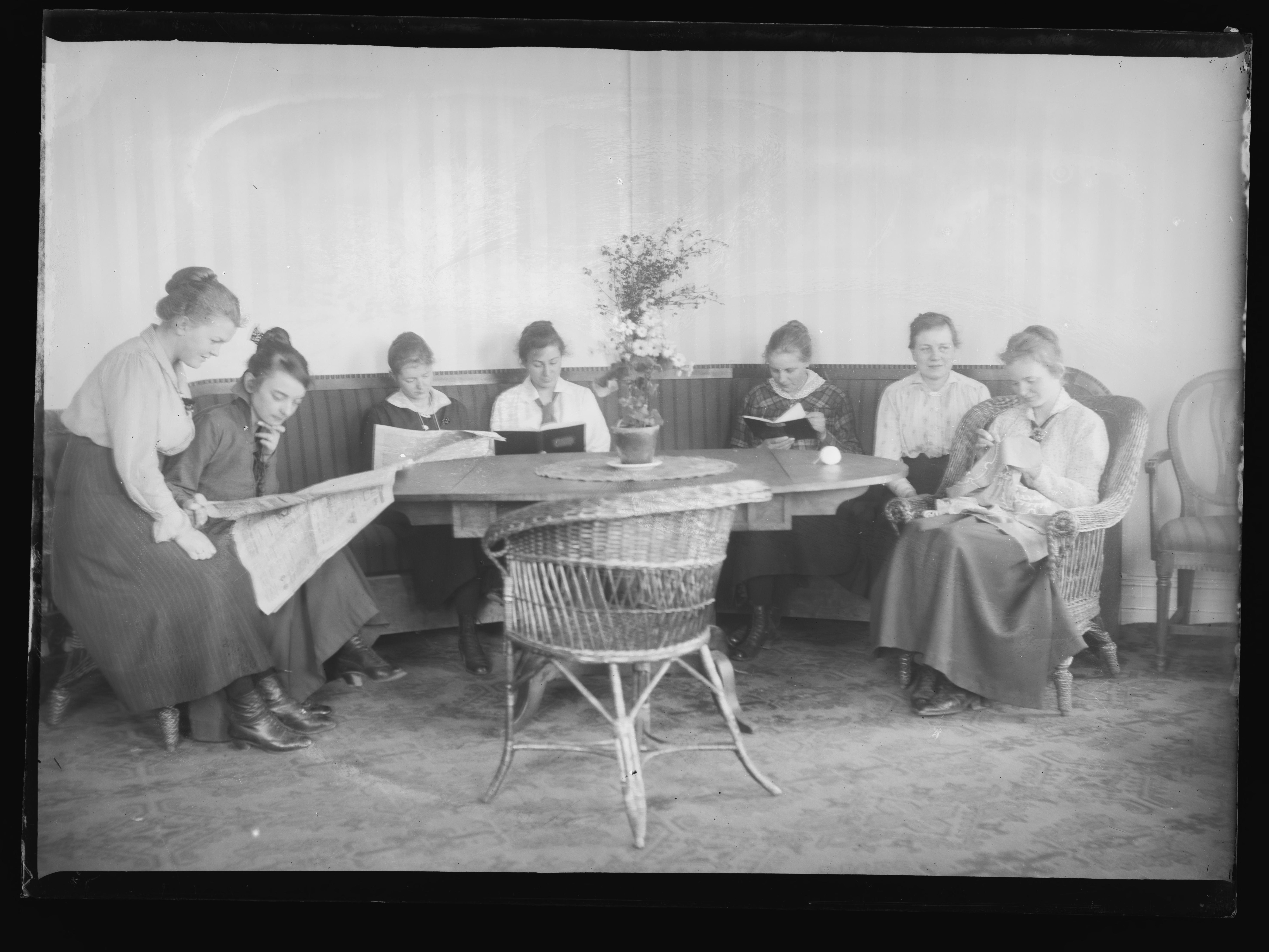 Bildet er hentet fra Nasjonalbibliotekets bildesamling. Anmerkninger til bildet var: Påskrift arkivark: Studenterhjemmet, Gjetemyrsveien 11 og 13 Arkivnummer: 243 Oslo,St. Hanshaugen, Oslo, Oslo